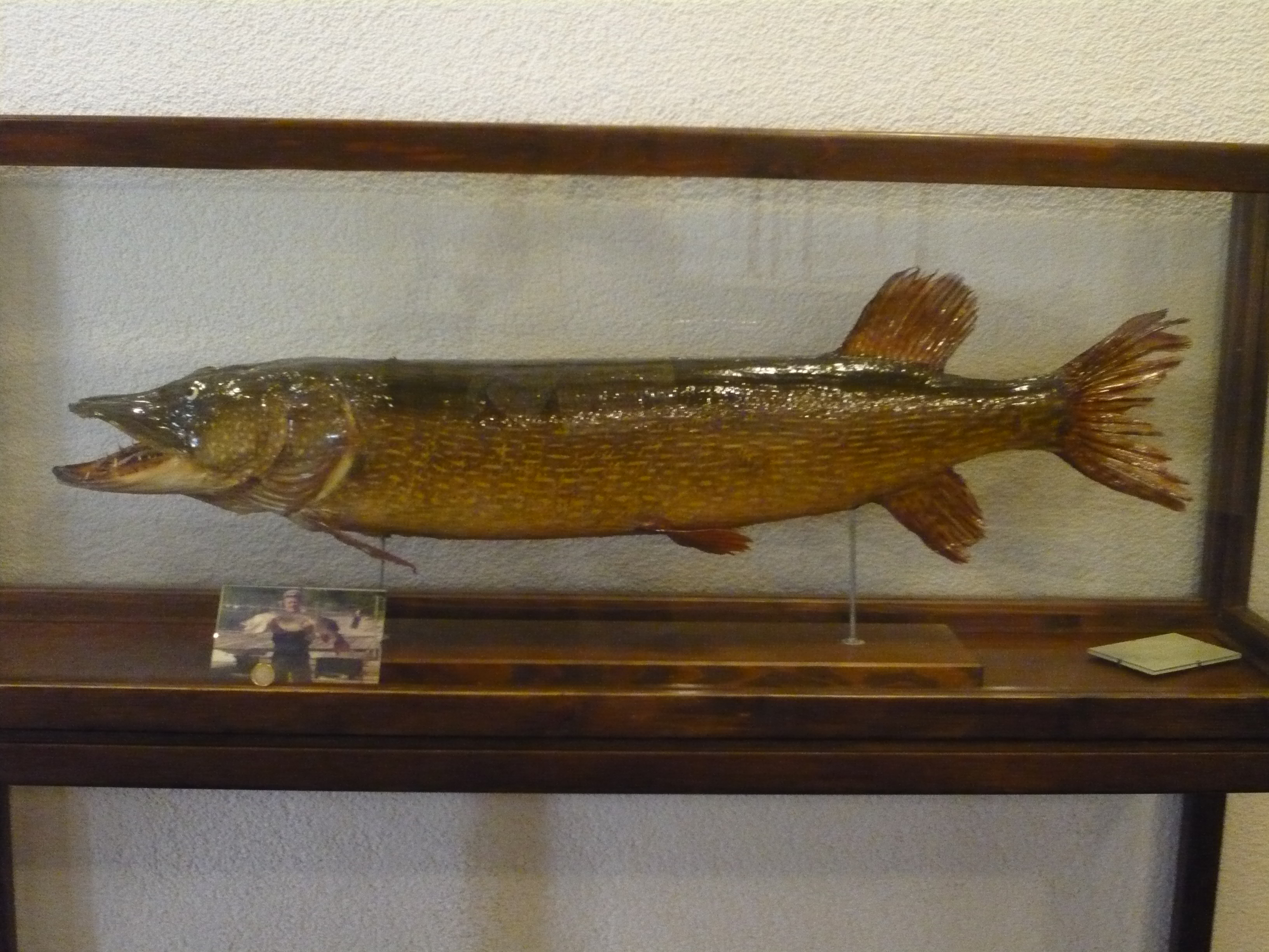 Größter Hecht, der bisher im Titisee gefangen wurde, ausgestellt im Kurhaus von Titisee Fangdatum: 16.09.1988 Länge: 1,32 Gewicht: 31 Pfund Alter: ca. 12 Jahre Fänger: Otto Rueb (Sportfischer vom SFV Titisee